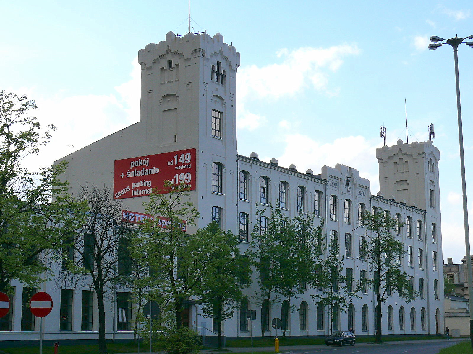 Fabryka Juliusza Kindermanna - Hotel Sporting w Łodzi